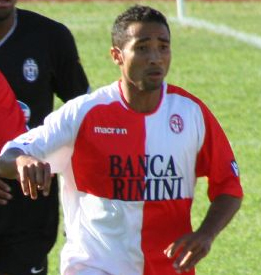 rimini-juventus, prima giornata di serie b 2006/07